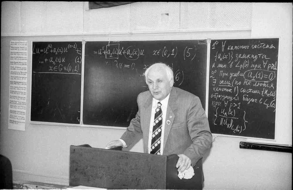 Владимир Александрович Ильин читает лекцию по теме «Управление колебаниями стержня, закрепленного на одном из концов». Университет города Переславля, 1 корпус, 3 комната. Владимир Александрович Ильин (2.05.1928) — математик, академик РАН, главный редактор журнала «Дифференциальные уравнения» (с 1995), член редакционной коллегии журнала РАН «Доклады Академии наук» (с 1998), лауреат Государственной премии СССР (1977).